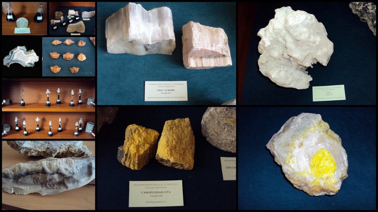 Татарча/tatarça: Халымбаджа4